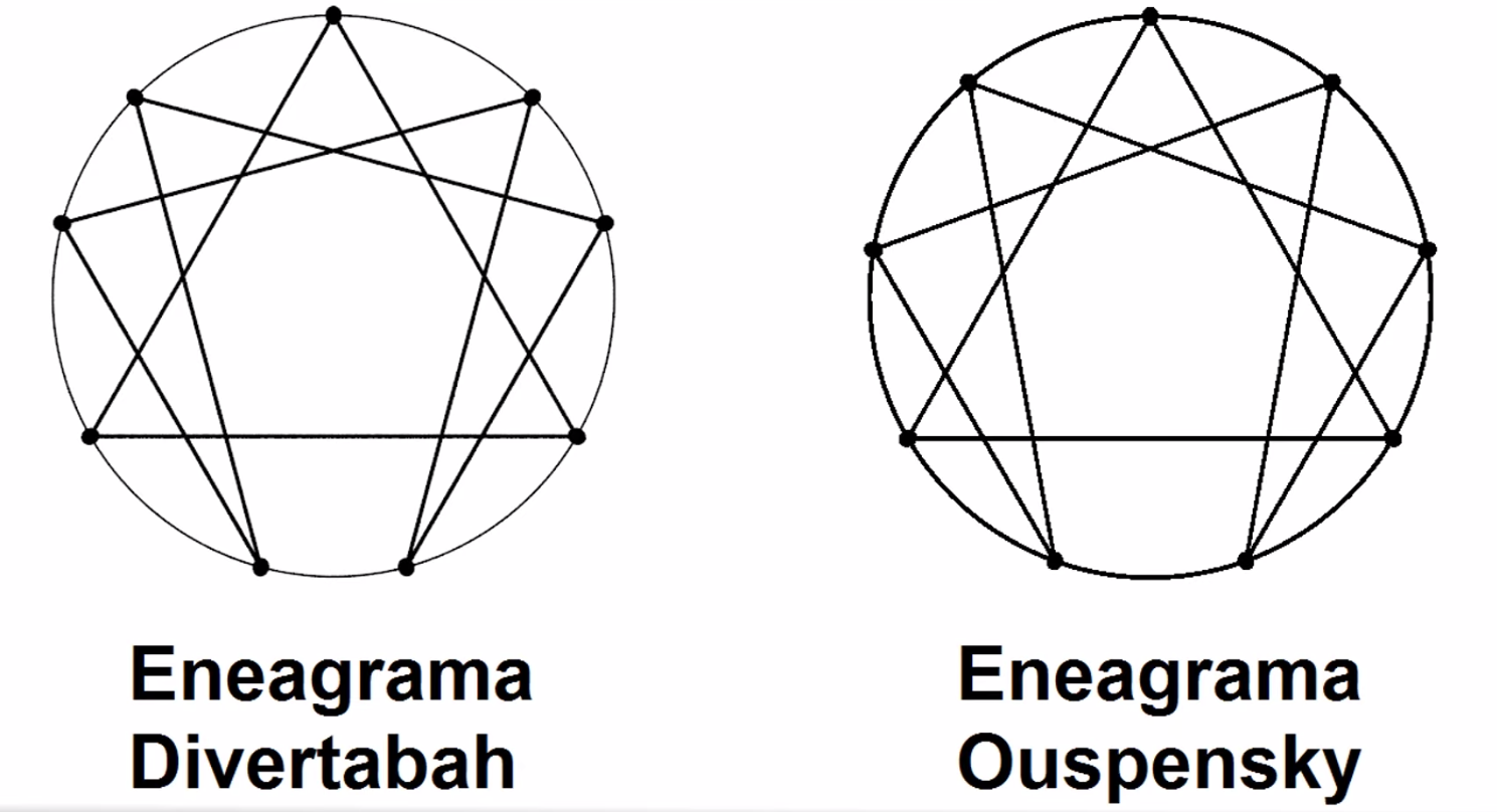 Comparació de la representació de l'enneagrama originalment dissenyat per Ouspenky (dreta) comparat amb la proposta de Javier Romañach basada en l'aplicació del nombre auri, una imatge que resulta de la projecció de la figura geomètrica Divertabah, creada per ell.